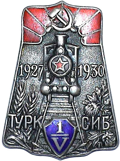 Нагрудный знак "Трехлетие Турксиба"